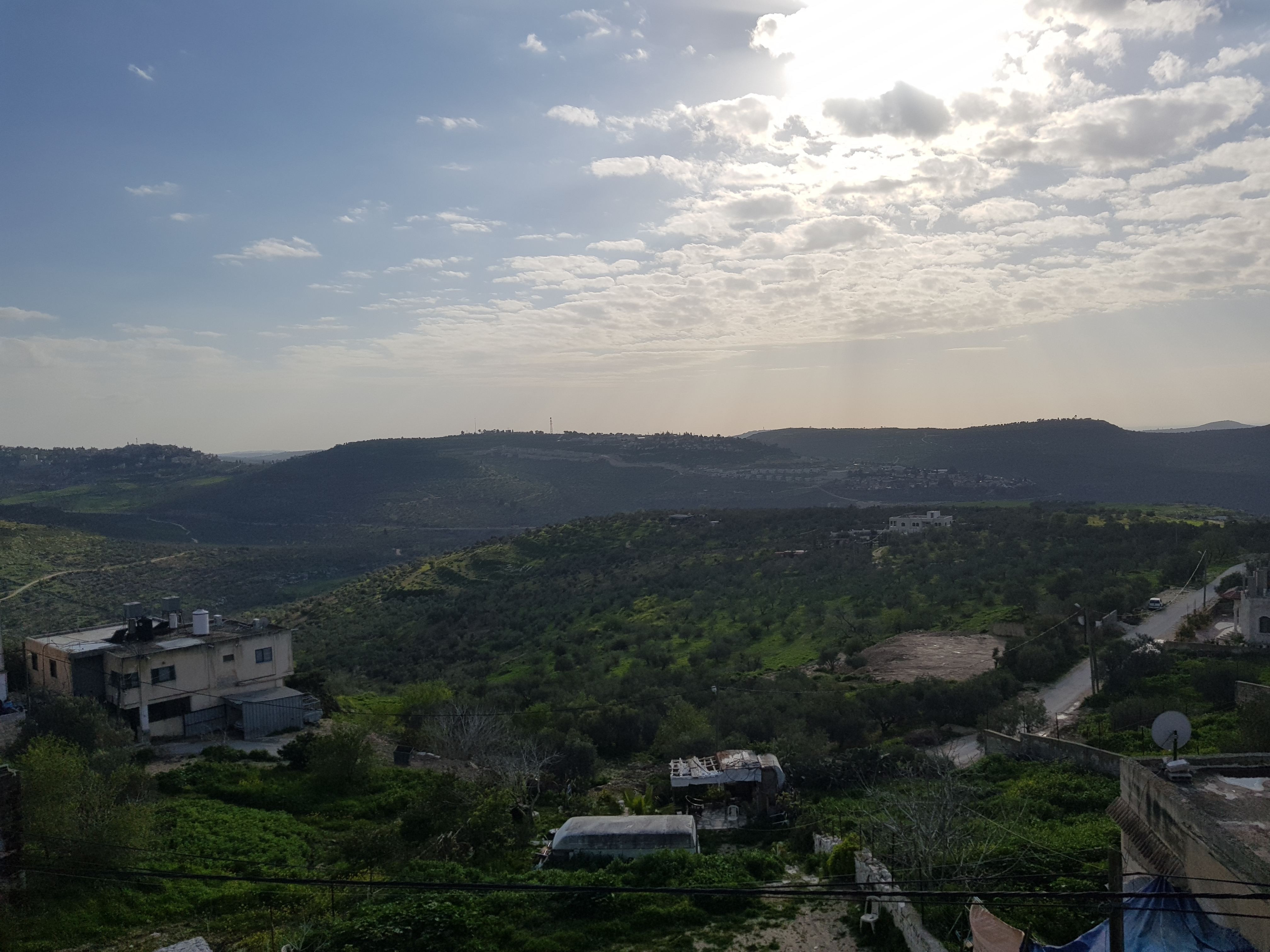 صورة لمستوطنة كدوميم المقامة بجانب القرية.